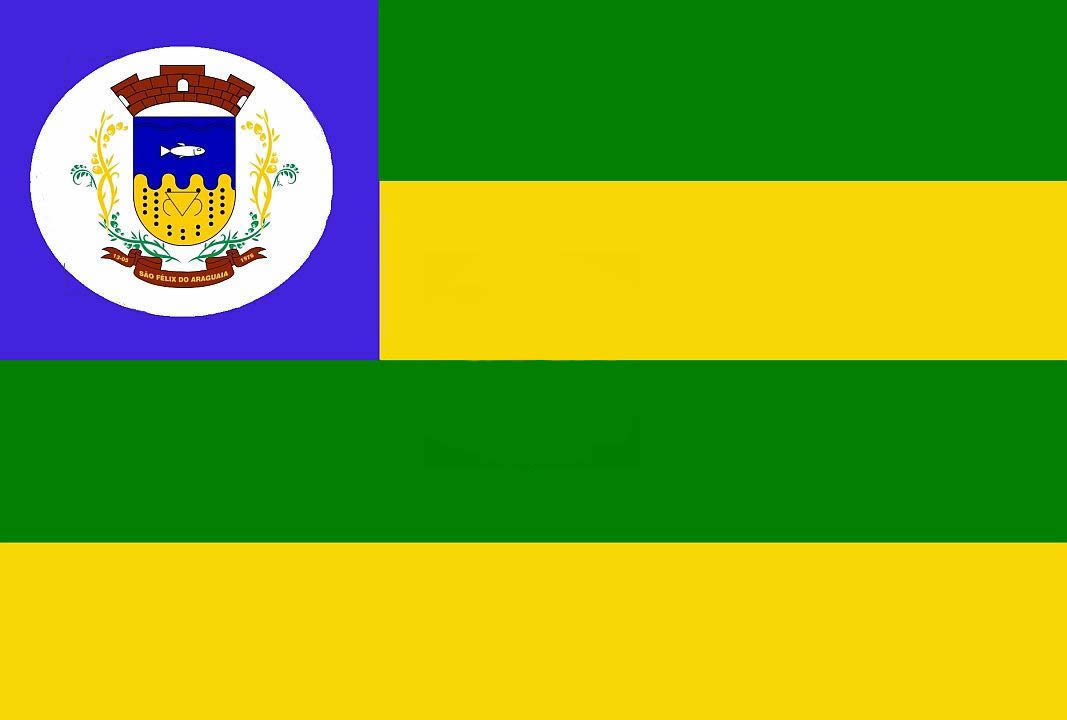 Município